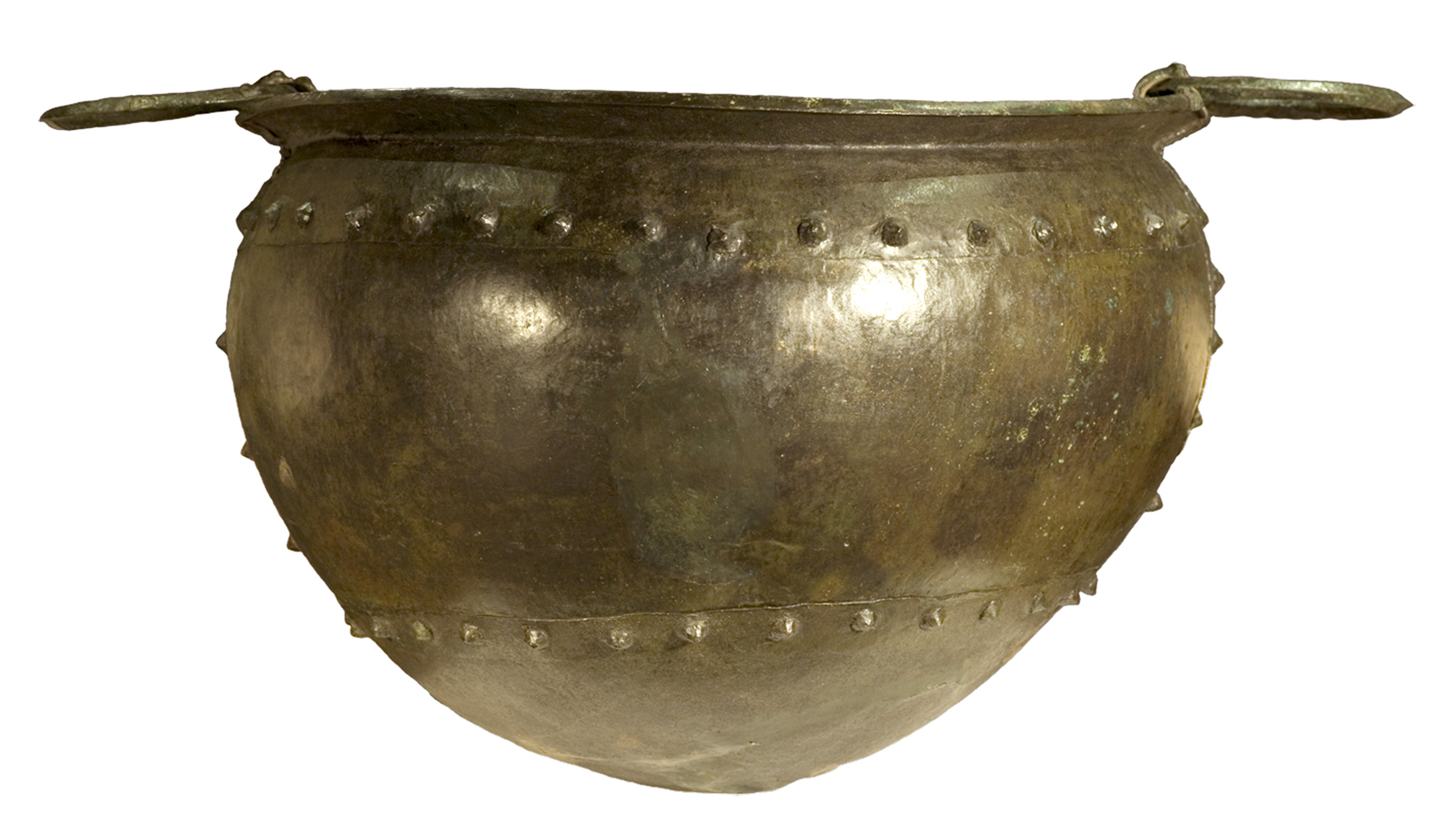 Esta pieza es un magnífico ejemplo de los calderos de remaches de tipo irlandés, extendidos por las islas Británicas, el oeste de Francia y el cuadrante noroccidental de la Península Ibérica durante la primera mitad del I milenio a.C. Como tal, el caldero de Cabárceno constituye un referente clásico para grandes temas de la Protohistoria, como los intercambios a larga distancia de objetos de lujo o la consolidación de aristocracias guerreras en las sociedades del Bronce final y los inicios de la Edad del Hierro.